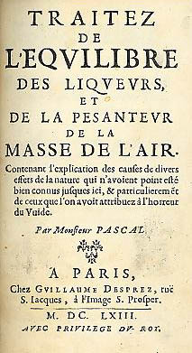 블레즈 파스칼의 표지.